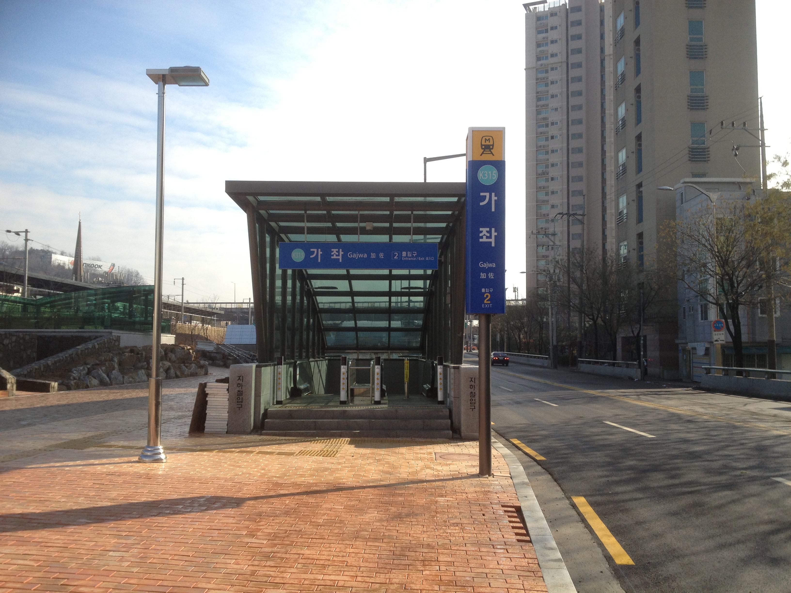 加佐駅2番出口